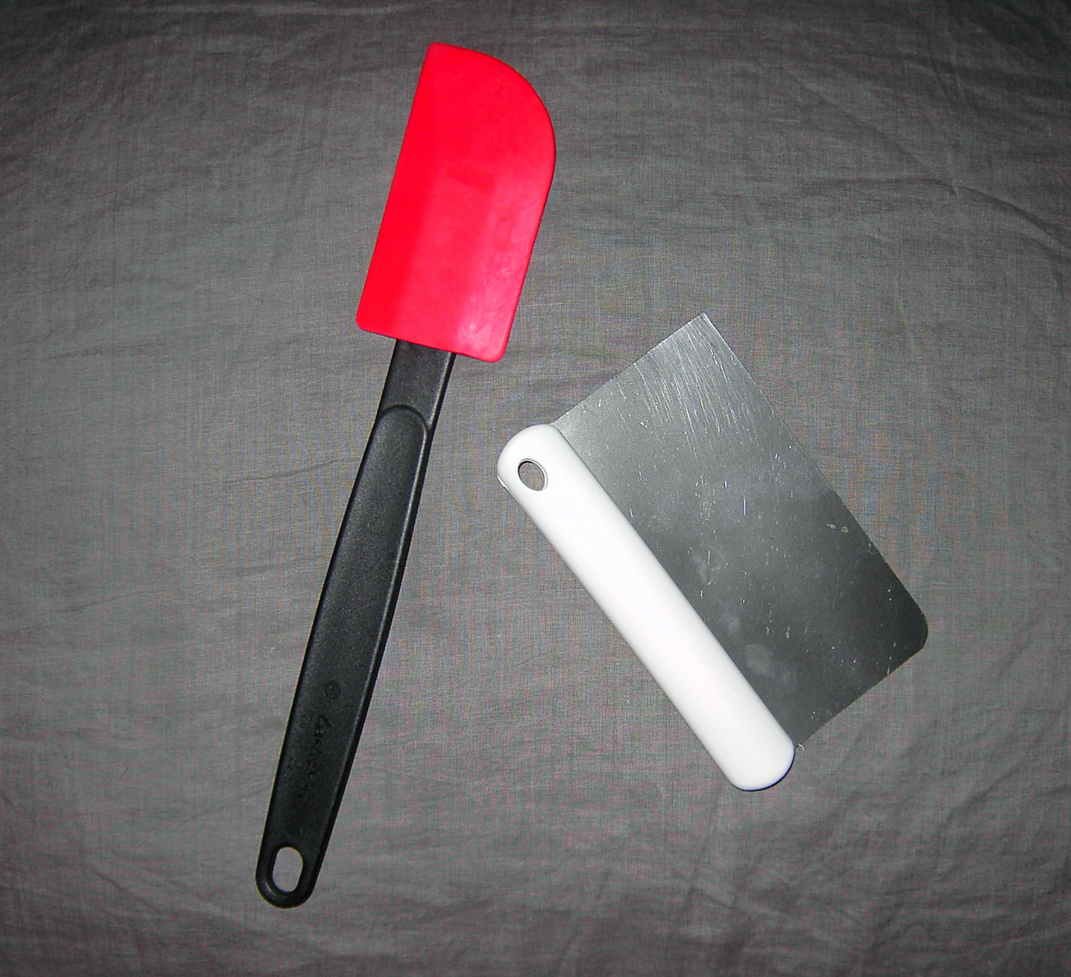 Degskrapor